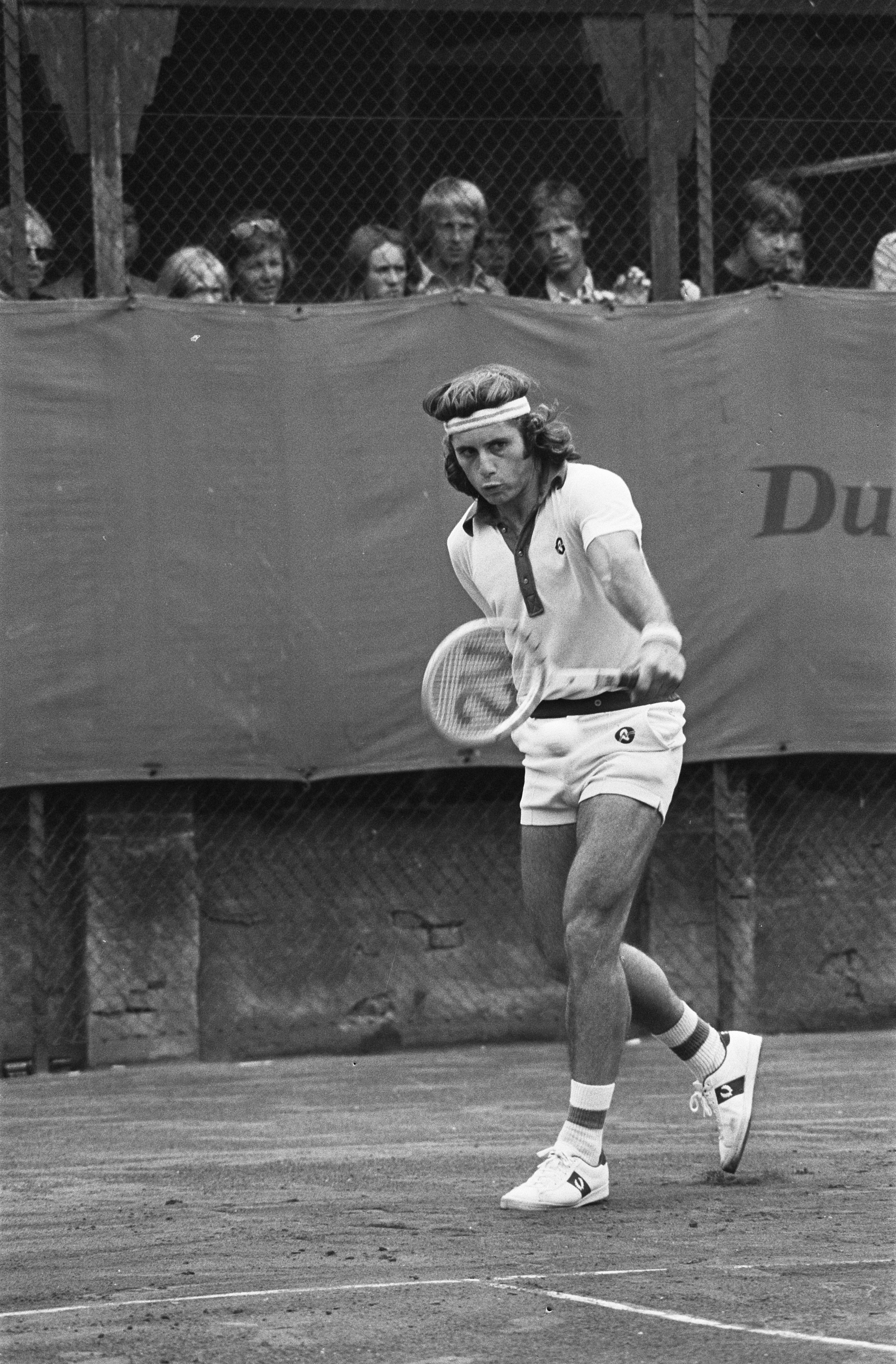 Collectie / Archief : Fotocollectie Anefo Reportage / Serie : Internationale tenniskampioenschappen 1975 op het Melkhuisje in Hilversum Beschrijving : Villas (Argentinië) in aktie Datum : 16 juli 1975 Locatie : Hilversum, Melkhuisje, Noord-Holland Trefwoorden : tennis, toernooien Persoonsnaam : Vilas, Guillermo Instellingsnaam : Melkhuisje, 't Fotograaf : Bert Verhoeff / Anefo Auteursrechthebbende : Nationaal Archief Materiaalsoort : Negatief (zwart/wit) Nummer archiefinventaris : bekijk toegang 2.24.01.05 Bestanddeelnummer : 928-0520